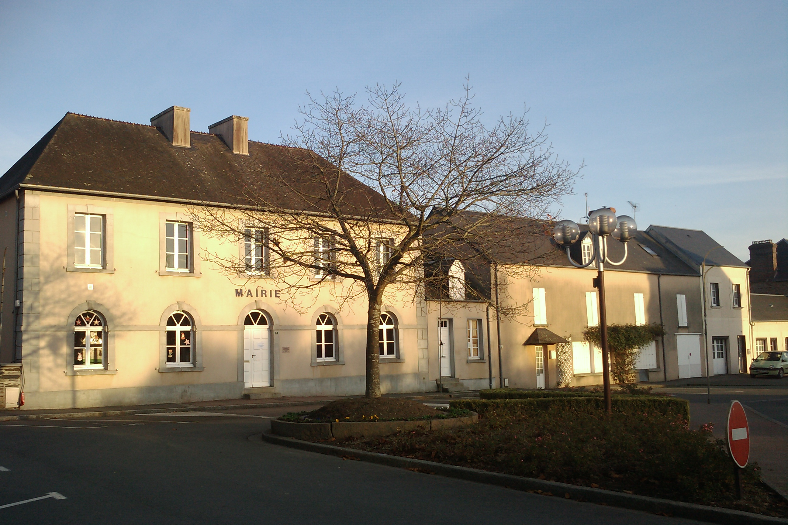 Mairie de Saint-Clair-sur-l'Elle